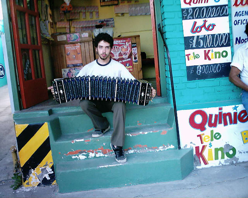 Foto de bandoneonista en Argentina